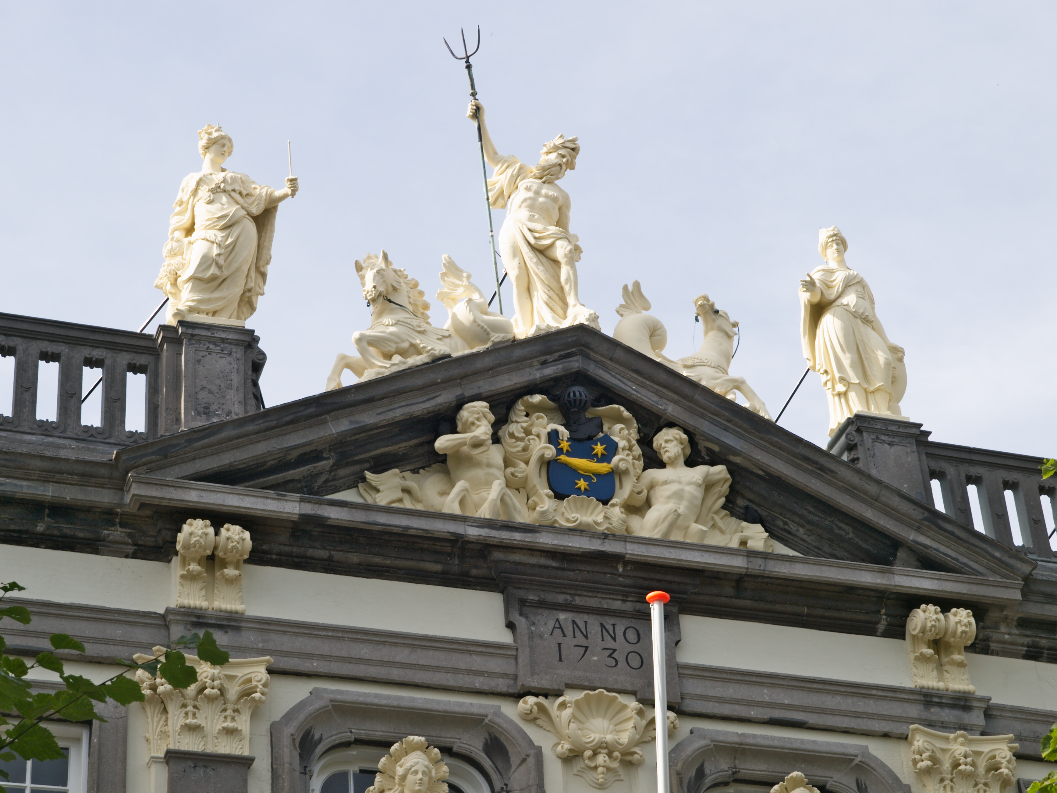 Rijksmonumenten Beelden op het dak van het beeldenhuis aan de Hendrikstraat 25 te Vlissingen.